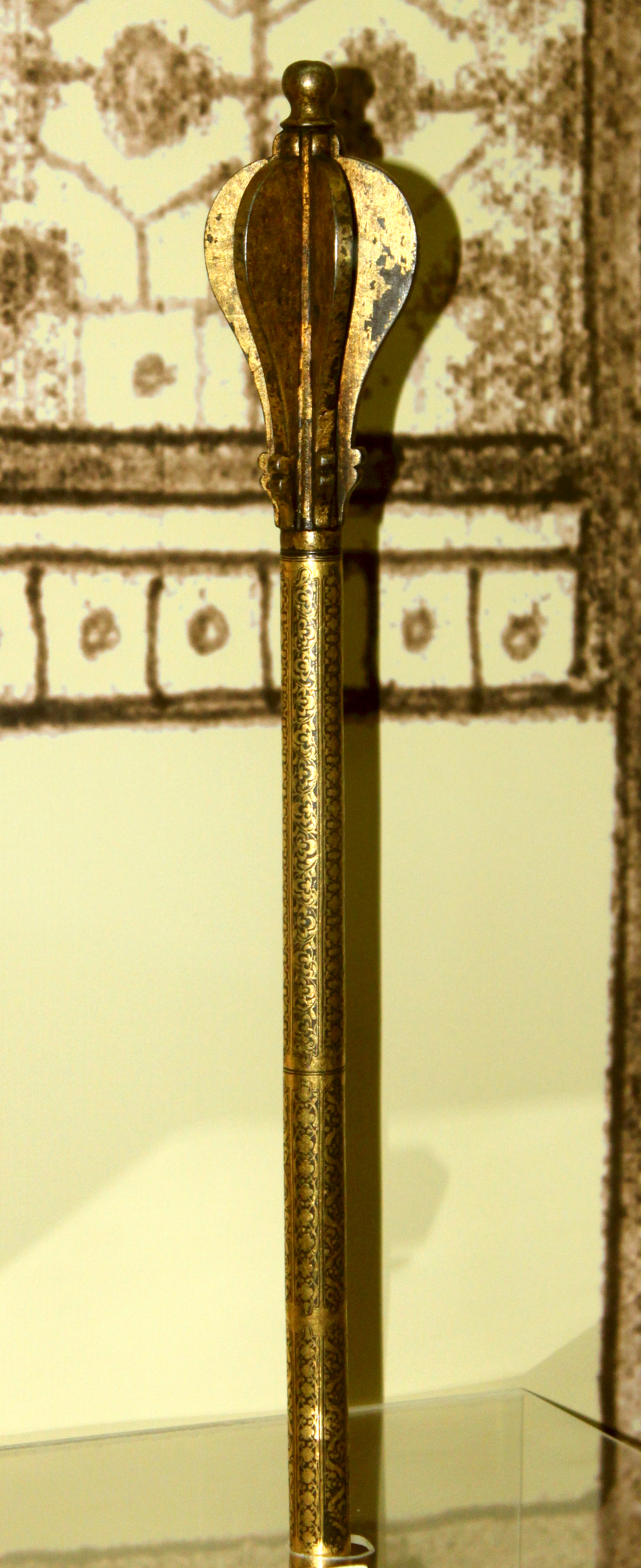 İbrahimxəlil xan Cavanşirin şeşpəri